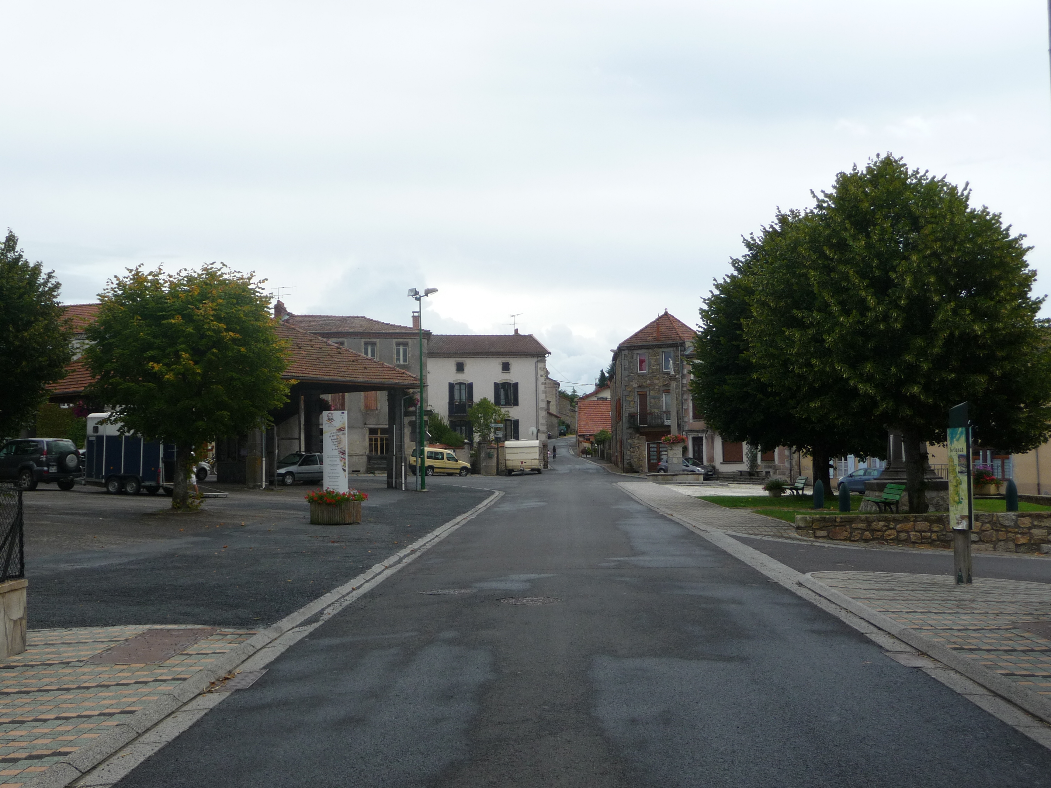 Place principale du village de Bertignat.